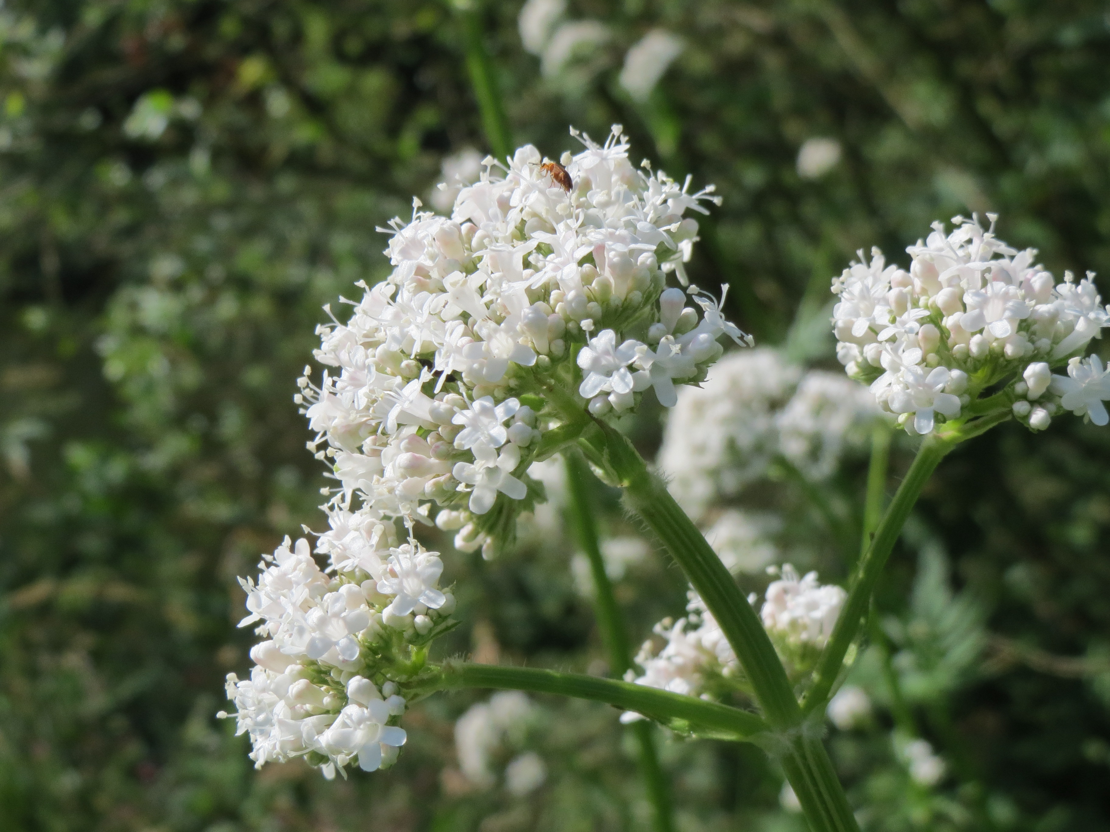 Baldrian (Valeriana officinalis) am Staden in Saarbrücken